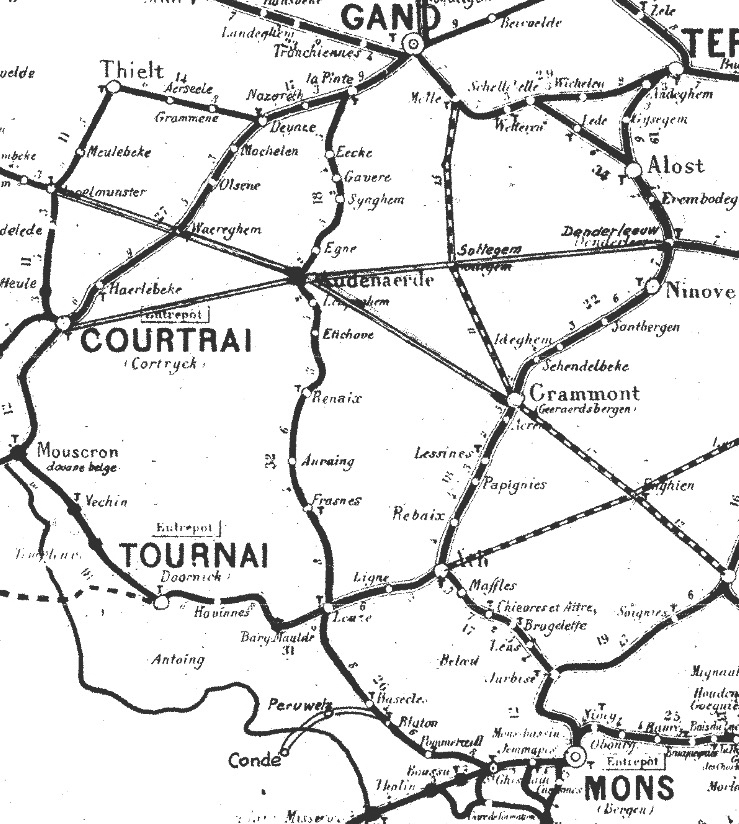 Extrait centré sur la ligne de Basècles à Gand par Audenarde et La Pinte.